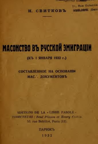 Обложка книги Н. Свиткова "Масонство въ русской эмиграцiи"